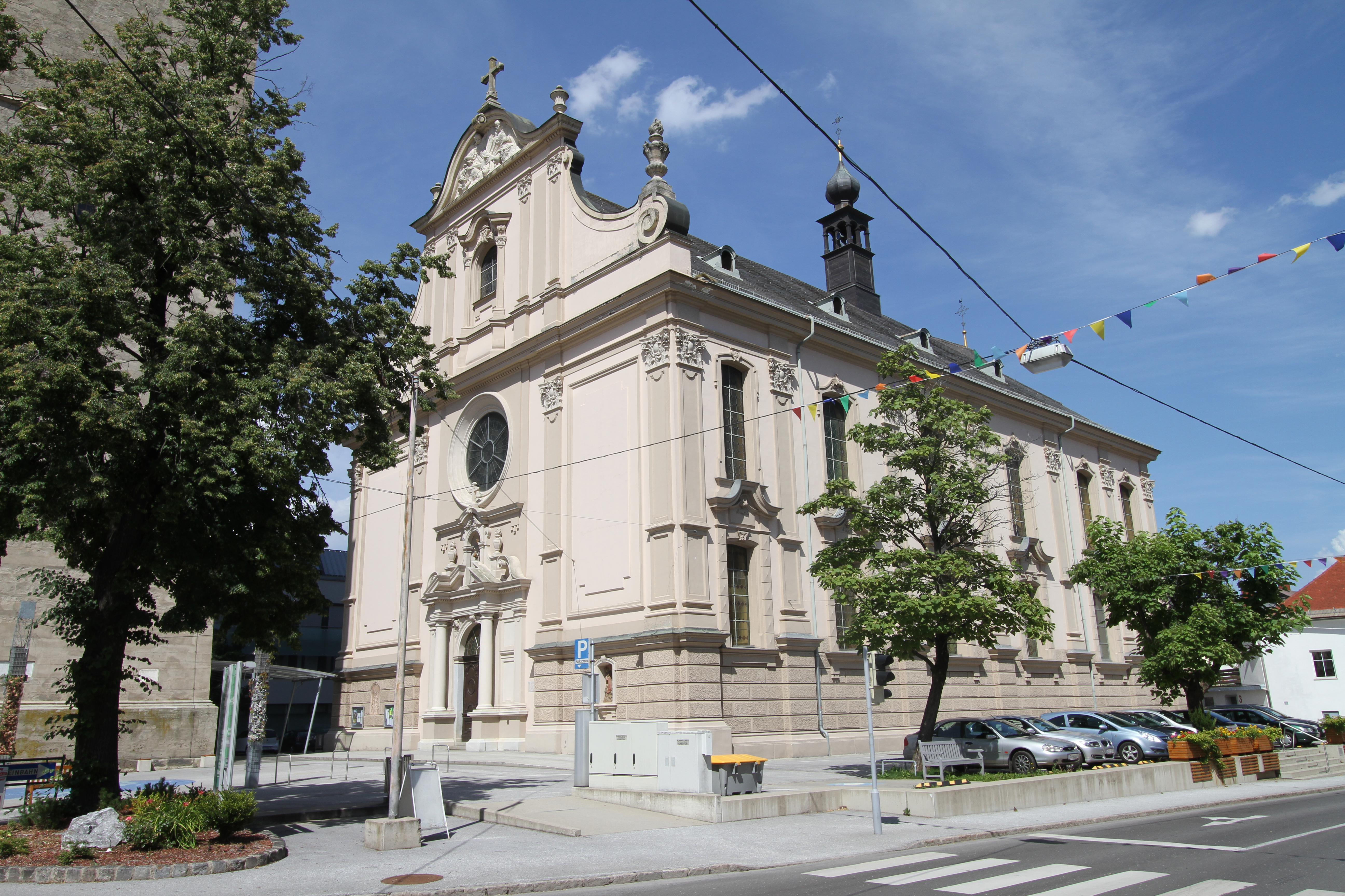 Kath. Pfarrkirche hl. Nikolaus